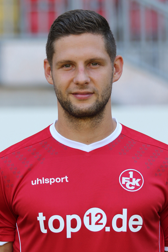 Stipe Vucur